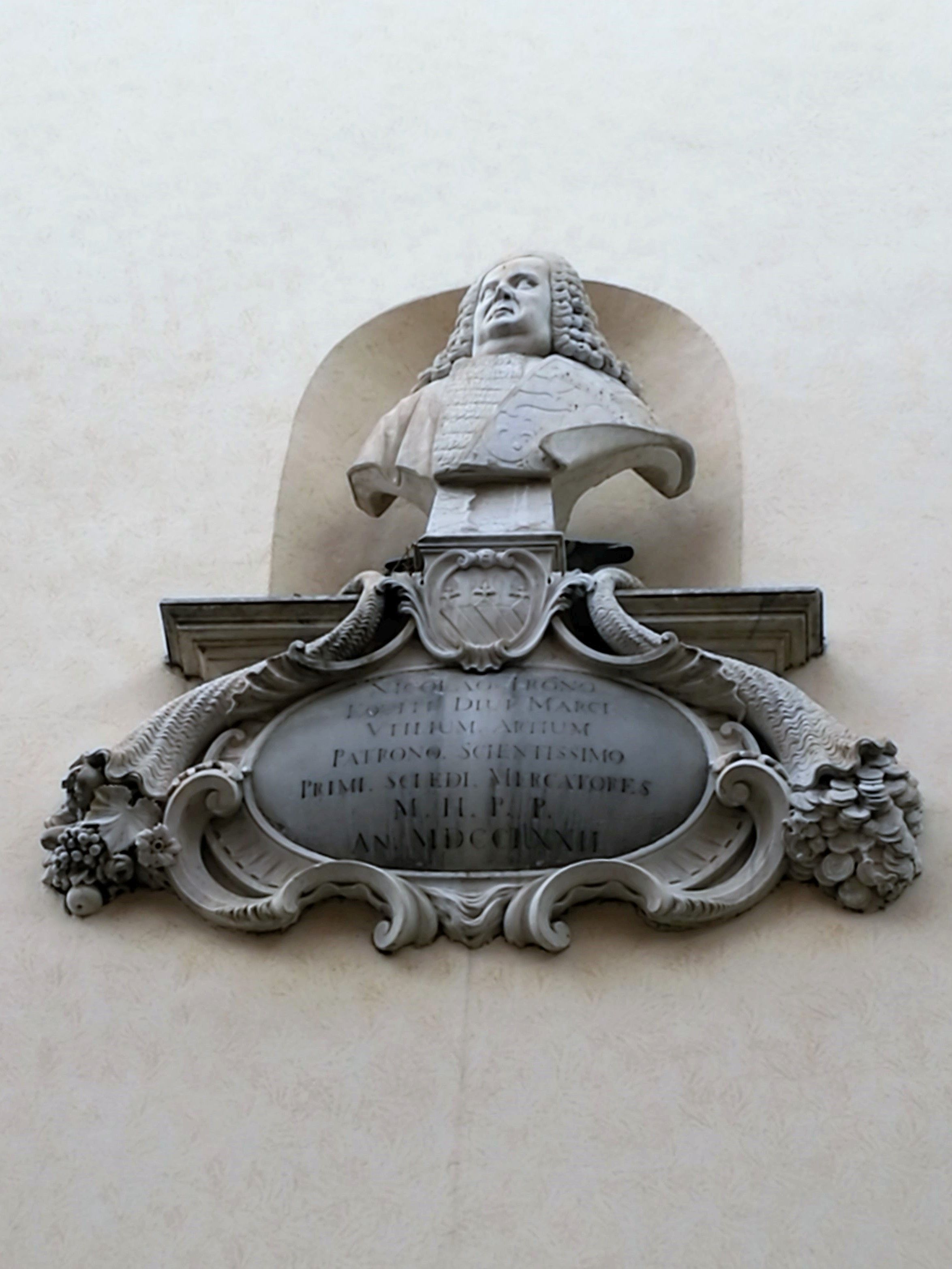 Niccolò Tron, busto di P. Danieletti sulla facciata dell'antico municipio di Schio, 1772, attuale Palazzo Toaldi Capra, Via Pasubio